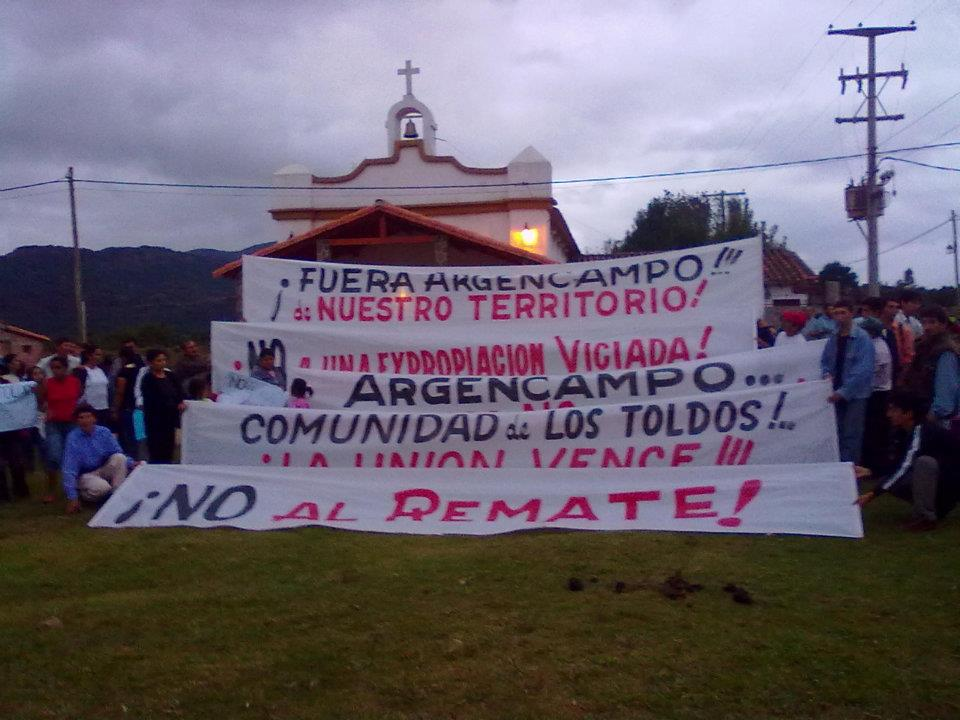 marcha contra injusta expropiación los toldos